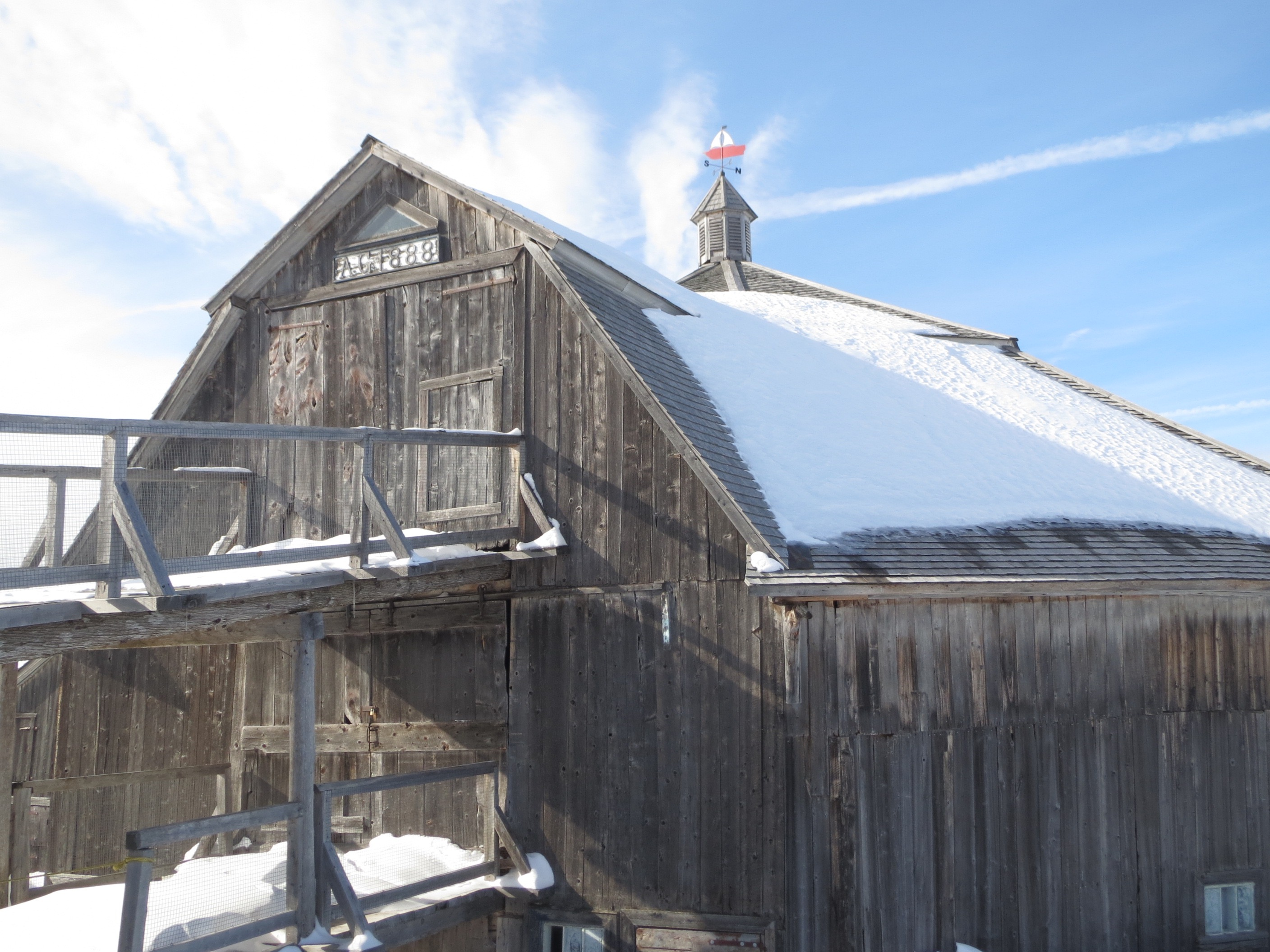 La Grange octogonale Adolphe-Gagnon, monument historique situé dans la municipalité de Saint-Fabien, au Québec.